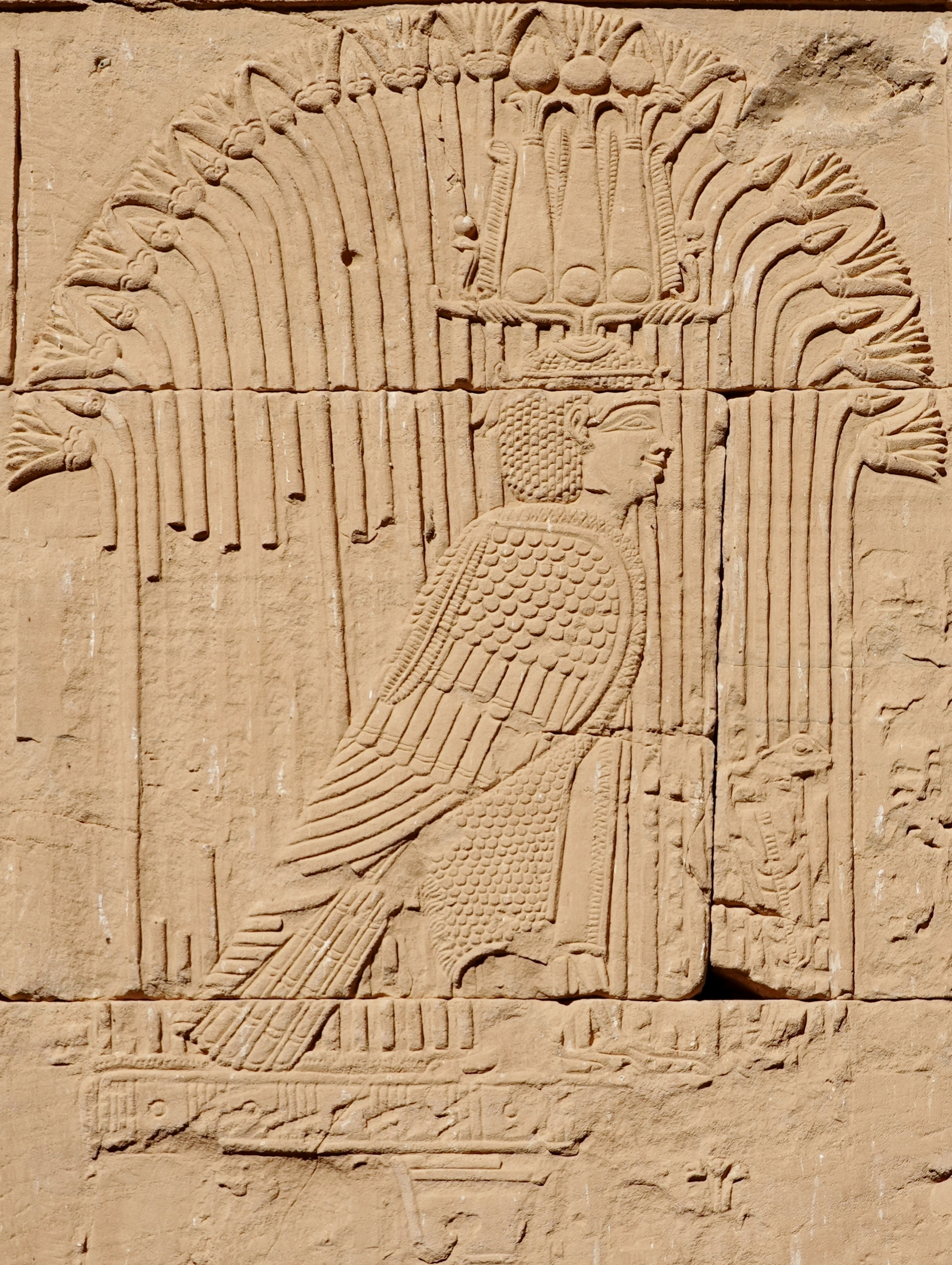 Mandulis-Tempel auf der Insel Neu-Kalabscha im Nassersee, Ägypten